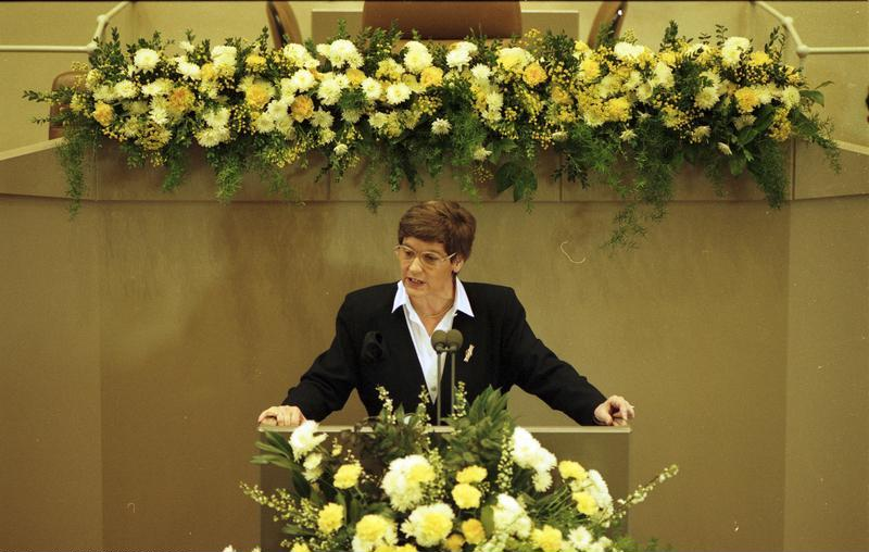 Bonn, 12. Januar 1990 Trauerstaatsakt für den am 31.12.1989 verstorbenen ehemaligen Bundesminister Dr. Gerhard Schröder. In Anwesenheit des Bundespräsidenten, des Präsidenten des Bundesverfassungsgerichts und von Mitgliedern der Bundesregierung, des Bundestages und des Bundesrates würdigten Bundestagspräsidentin Prof. Rita Süssmuth, Bundeskanzler Dr. Helmut Kohl und der frühere Bischof Dr. D. Hermann Kunst das politische Lebenswerk des Verstorbenen.